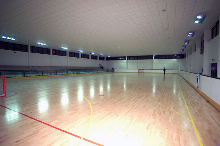 Foto palazzetto Viale Ferrarin di Vicenza sede delle partite dei Diavoli Vicenza.